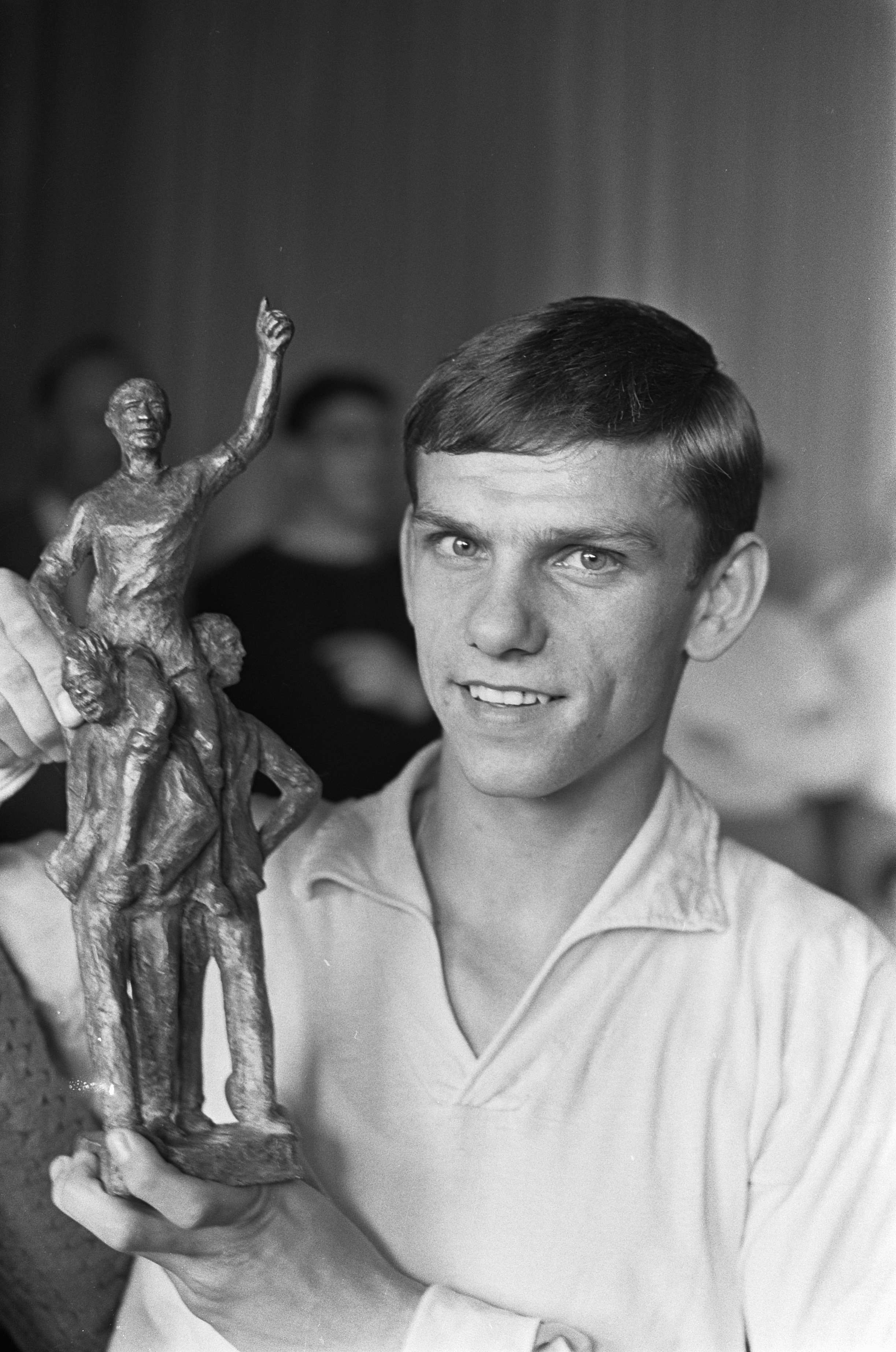 Collectie / Archief : Fotocollectie Anefo Reportage / Serie : [ onbekend ] Beschrijving : Willy Dullens voetballer van het jaar, Willy Dullens met het beeldje Datum : 20 mei 1966 Trefwoorden : sport, voetballers Persoonsnaam : Dullens, Willy Fotograaf : Kroon, Ron / Anefo Auteursrechthebbende : Nationaal Archief Materiaalsoort : Negatief (zwart/wit) Nummer archiefinventaris : bekijk toegang 2.24.01.05 Bestanddeelnummer : 919-1752